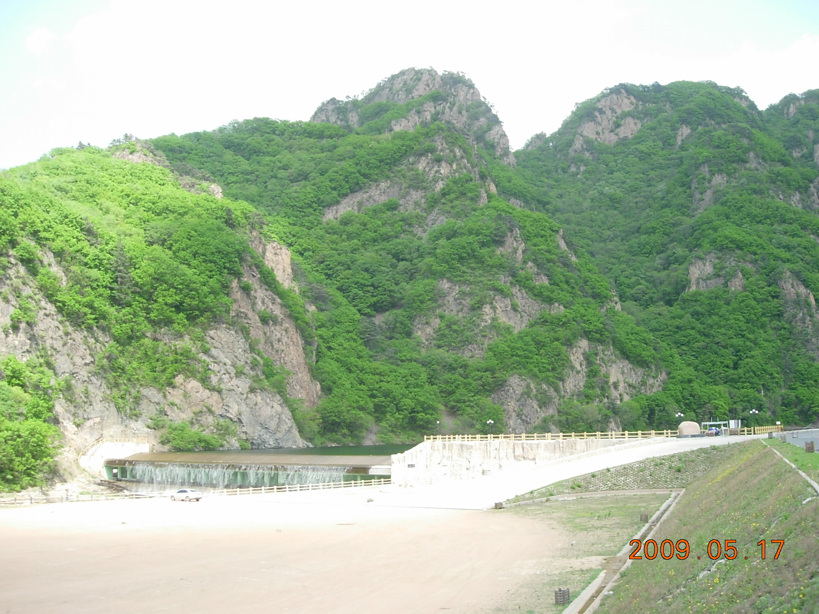 关门山入口